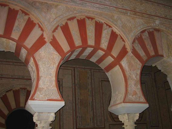 Medina Al Azhara - Arco em ferradura